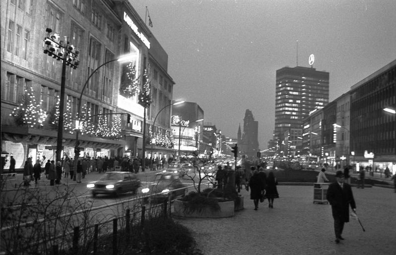 Berlin-West Tauentzienstrasse vom Wittenberg-Platz